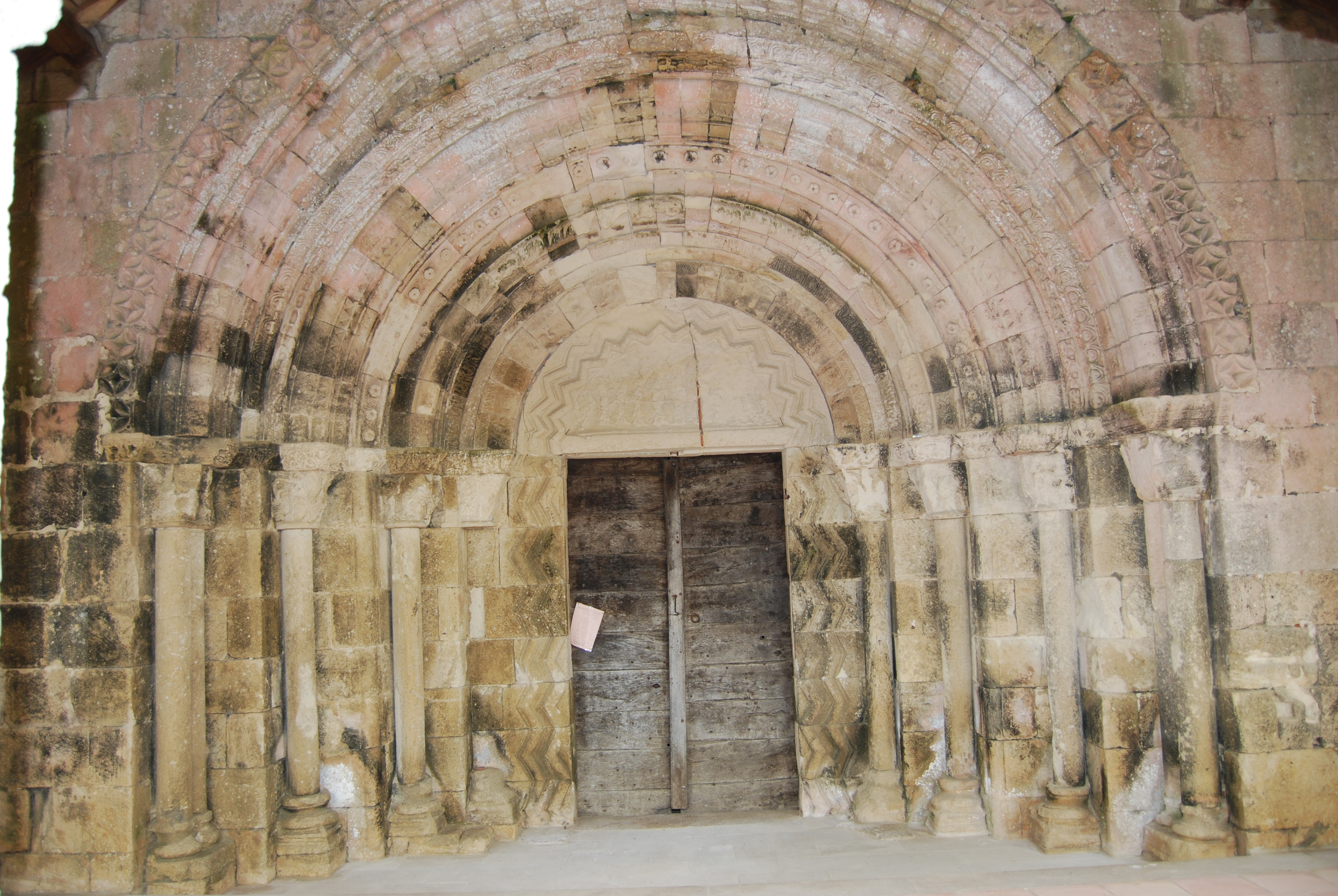 Église Saint-Martin de Lugasson, (Inscrit, 1925) .